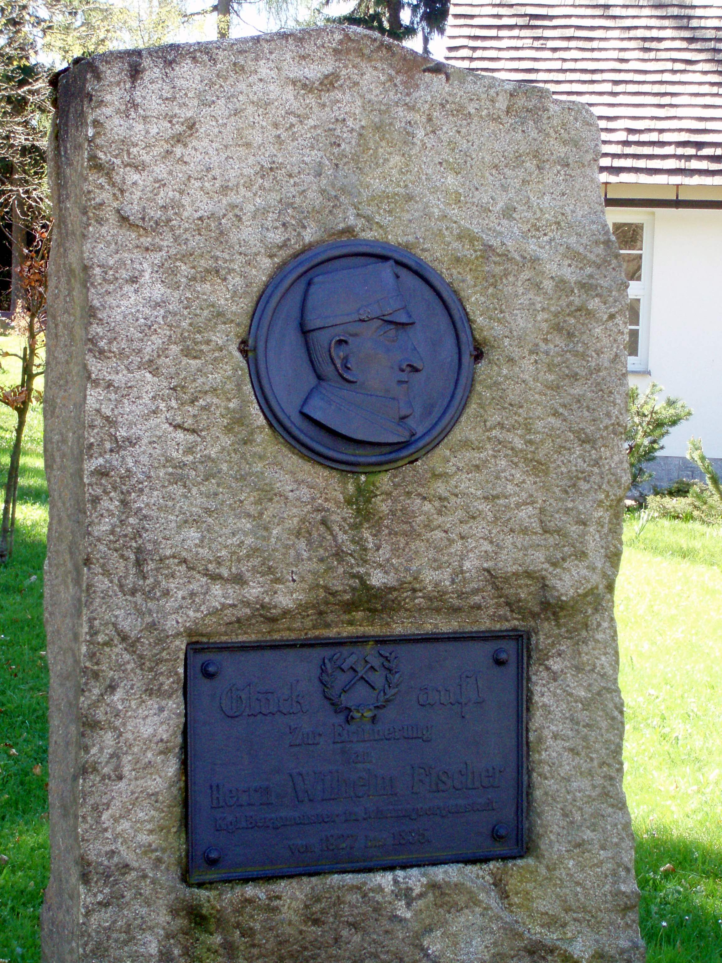 Fischer-Stein in Johanngeorgenstadt